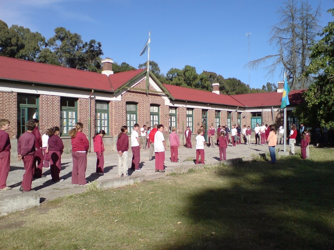 Niños junto al Colegio Argentino Danés, en Tres Arroyos, prov. de Buenos Aires